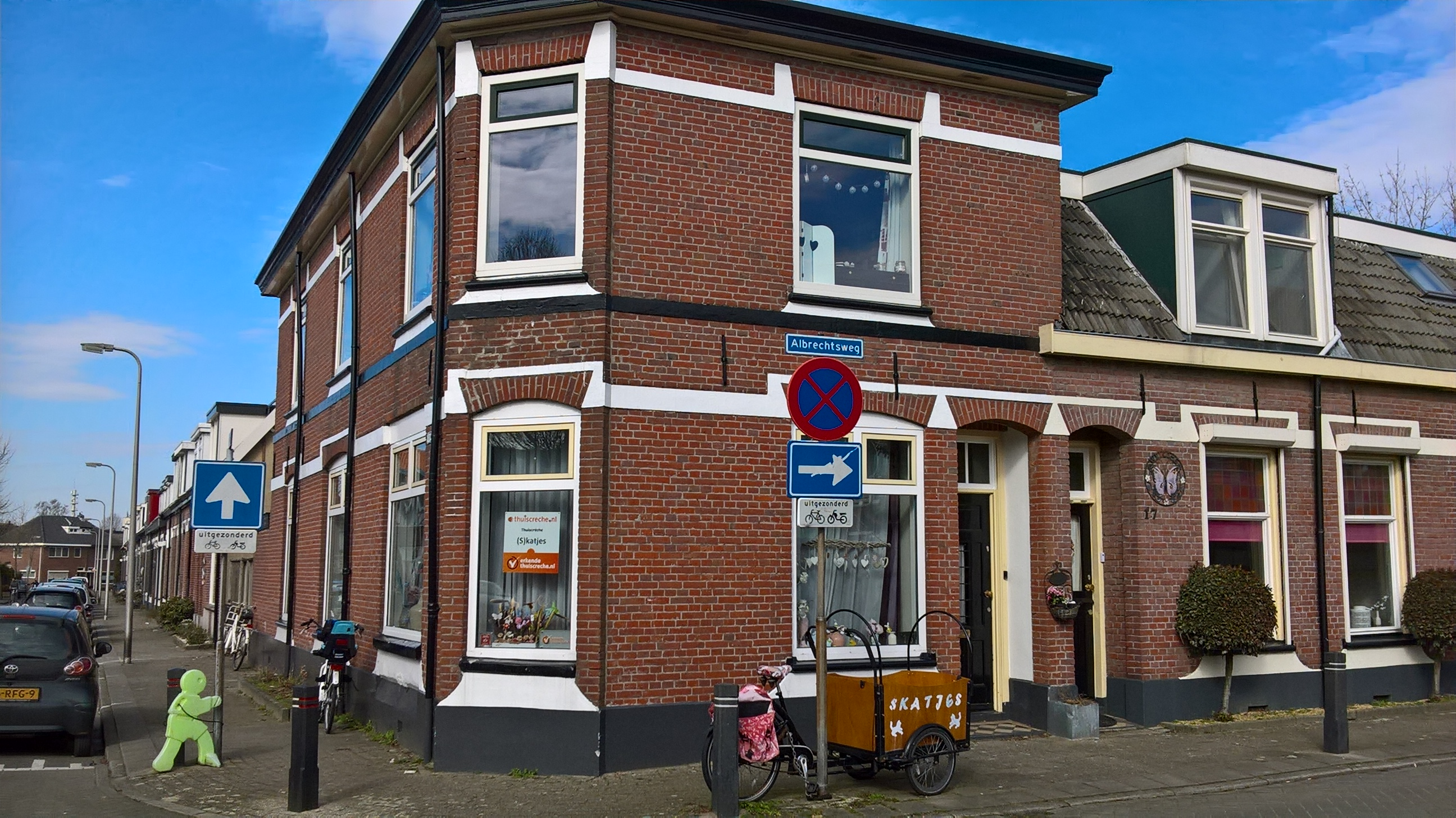 oorspronkelijk weeshuis in Hengelo(O)